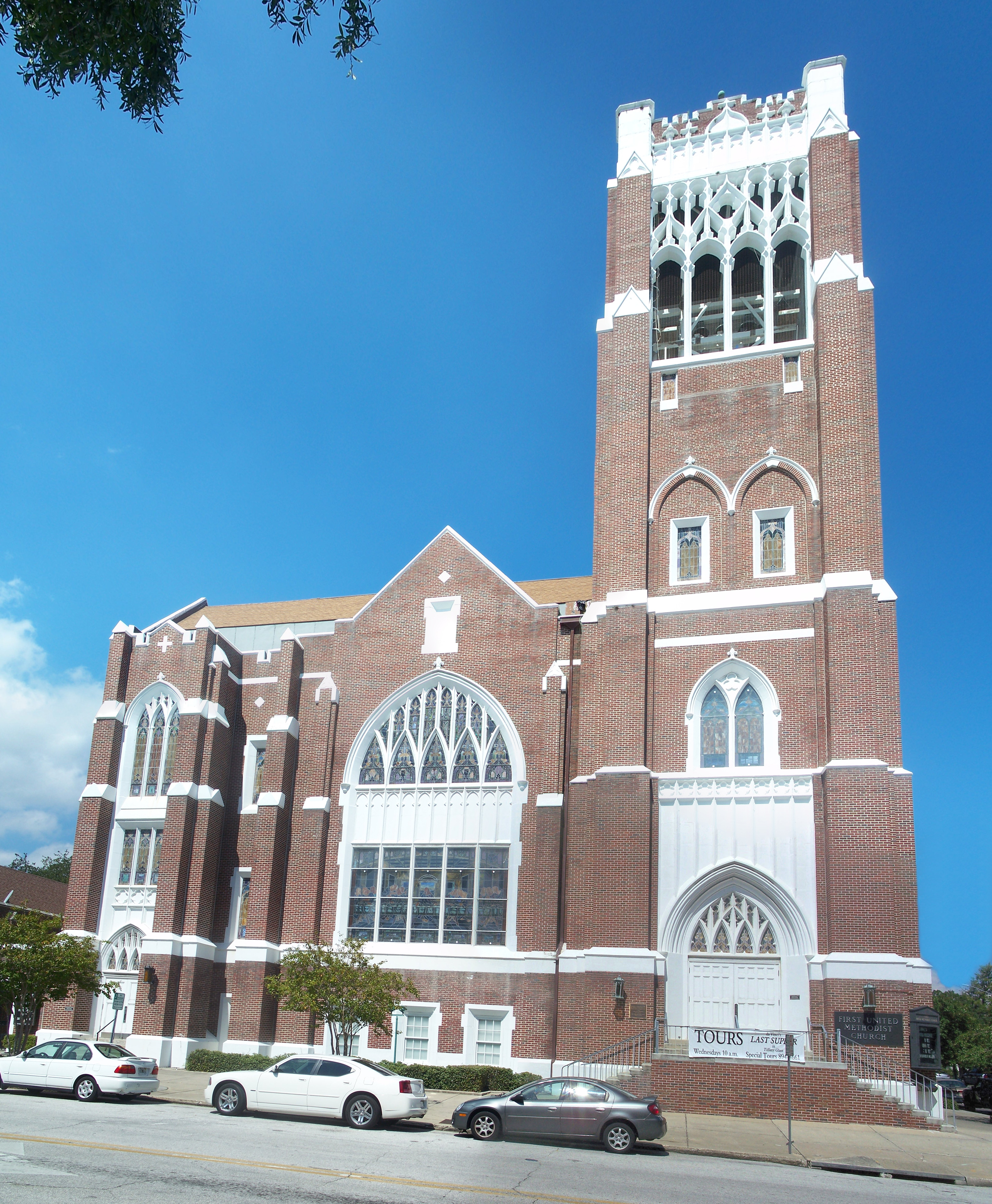 St. Petersburg, Florida: First Methodist Church of St. Petersburg